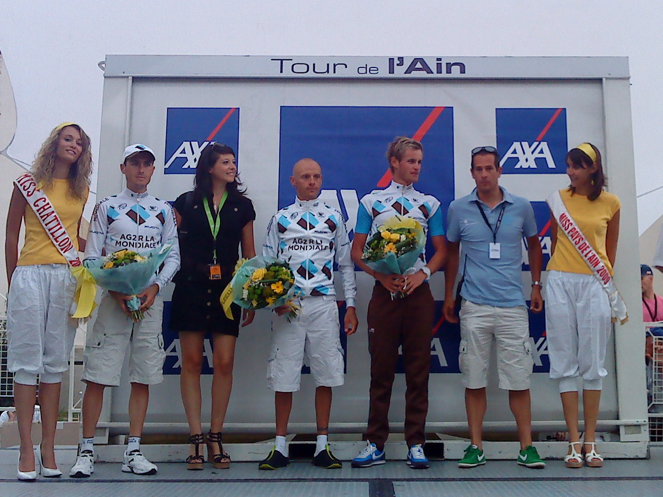 Classement final du Tour de l'Ain 2010 : meilleur équipe composée de Hubert Dupont, John Gadret et Maxime Bouet (directeur sportif Julien Jurdie)